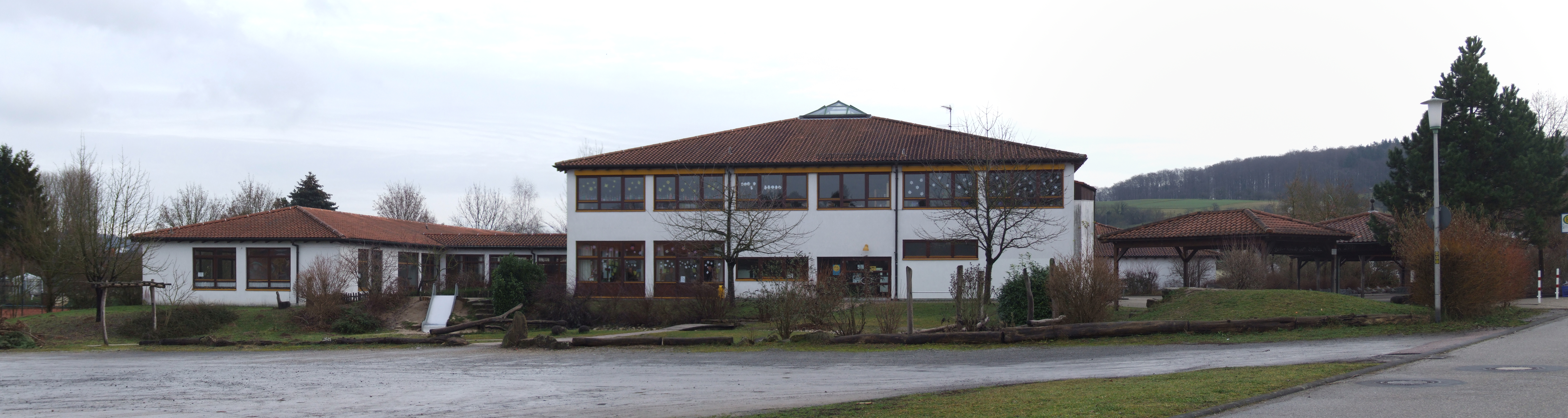 Schlosswiesenschule Eschelbronn